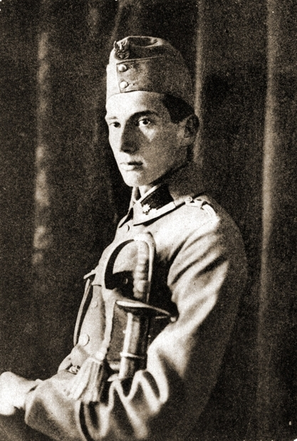 Ogniomistrz Józef Beck w 1914 r.